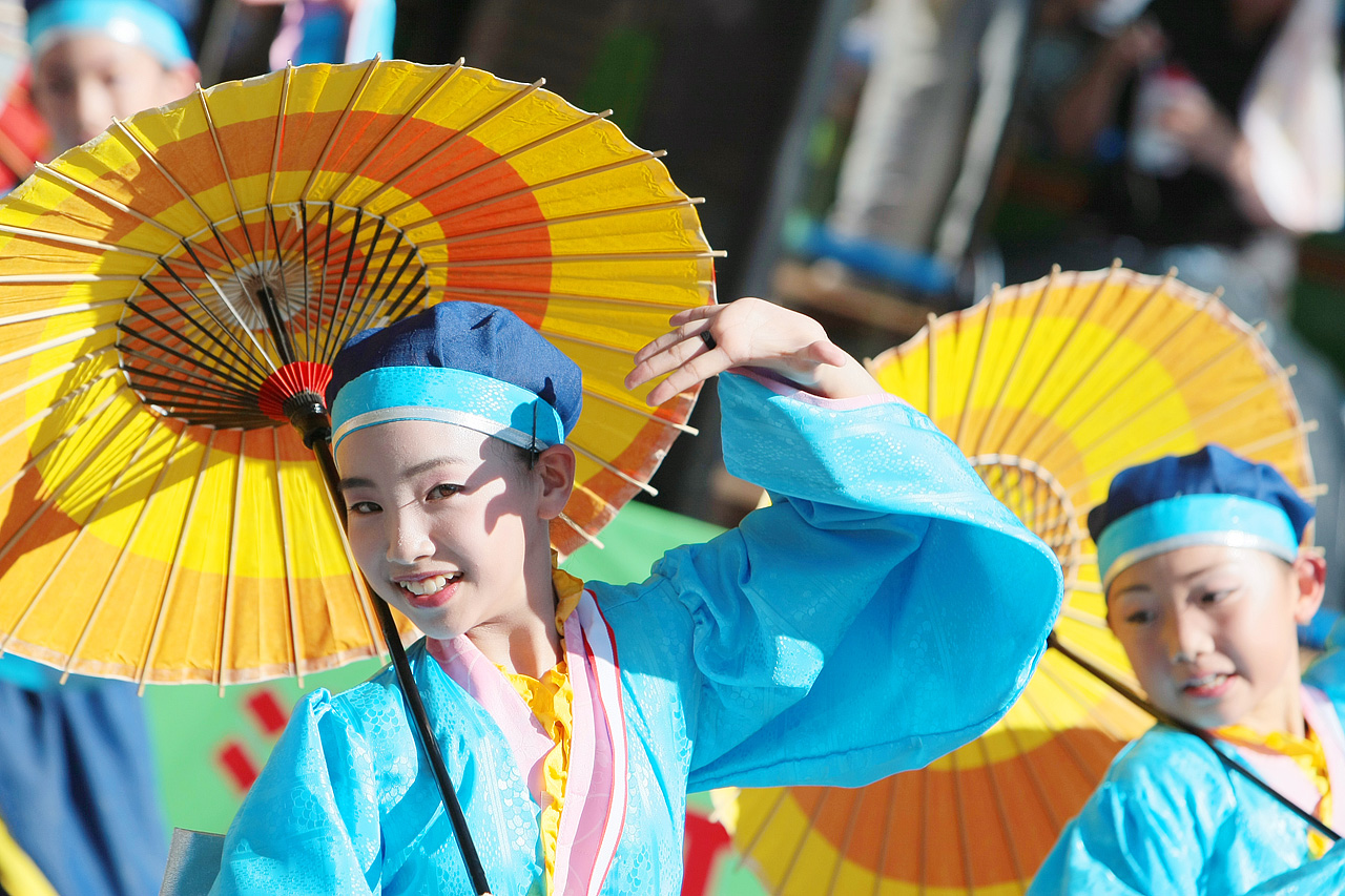 高知よさこい祭り2008